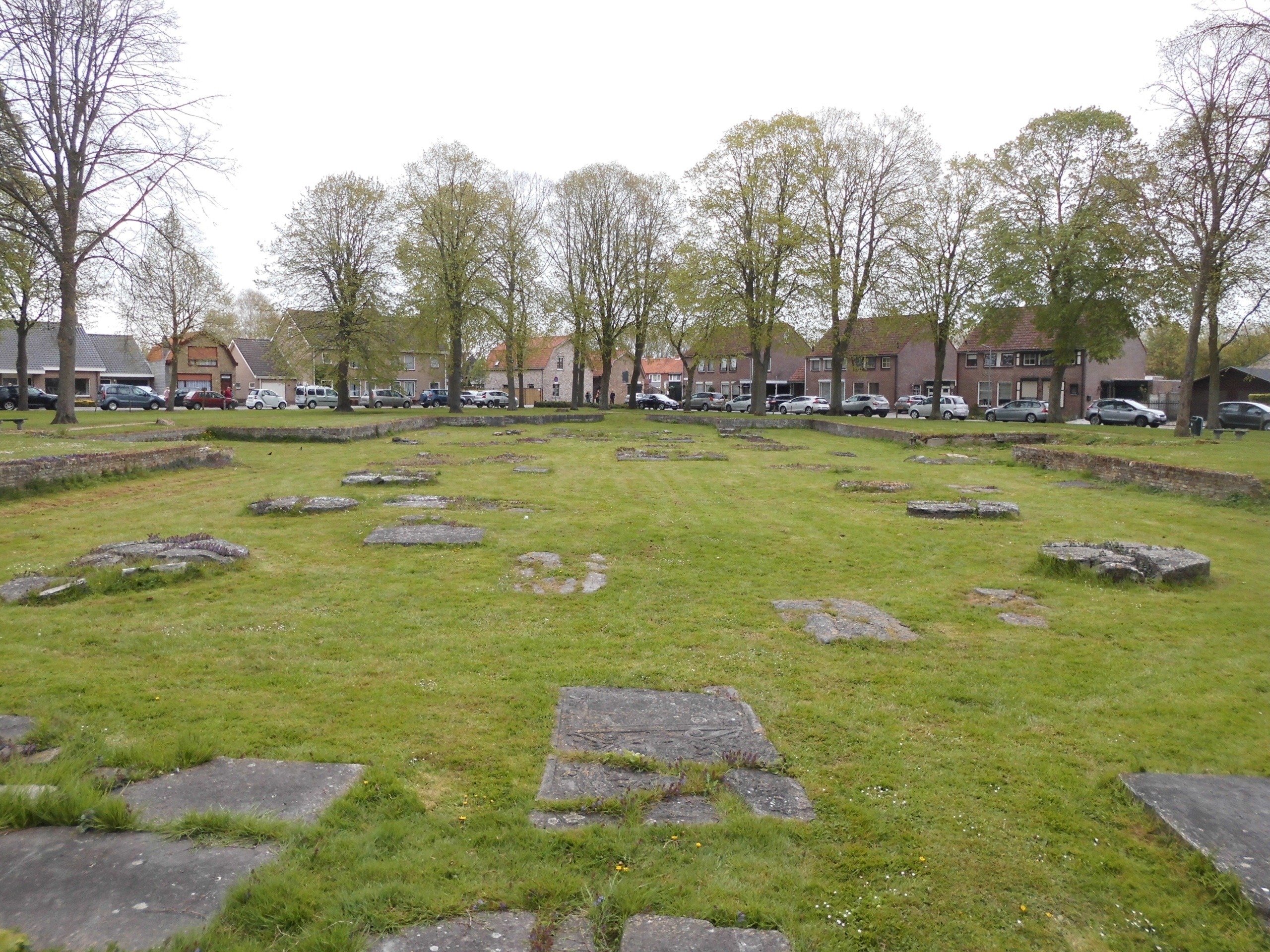 De restanten van de Sint-Janskerk - Sint-Jansstraat - stad Sluis - gemeente Sluis - Zeeuws-Vlaanderen - Zeeland - Nederland